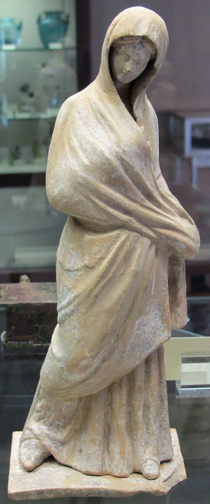 Arte greca, statuetta di donna con mantello, da tanagra, 350-300 ac. ca.